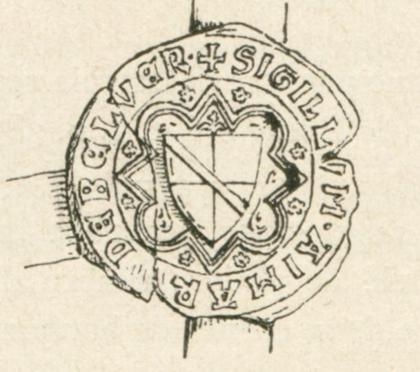 Sceau de Siboud de Beauvoir en 1231, par Joseph Roman en 1913